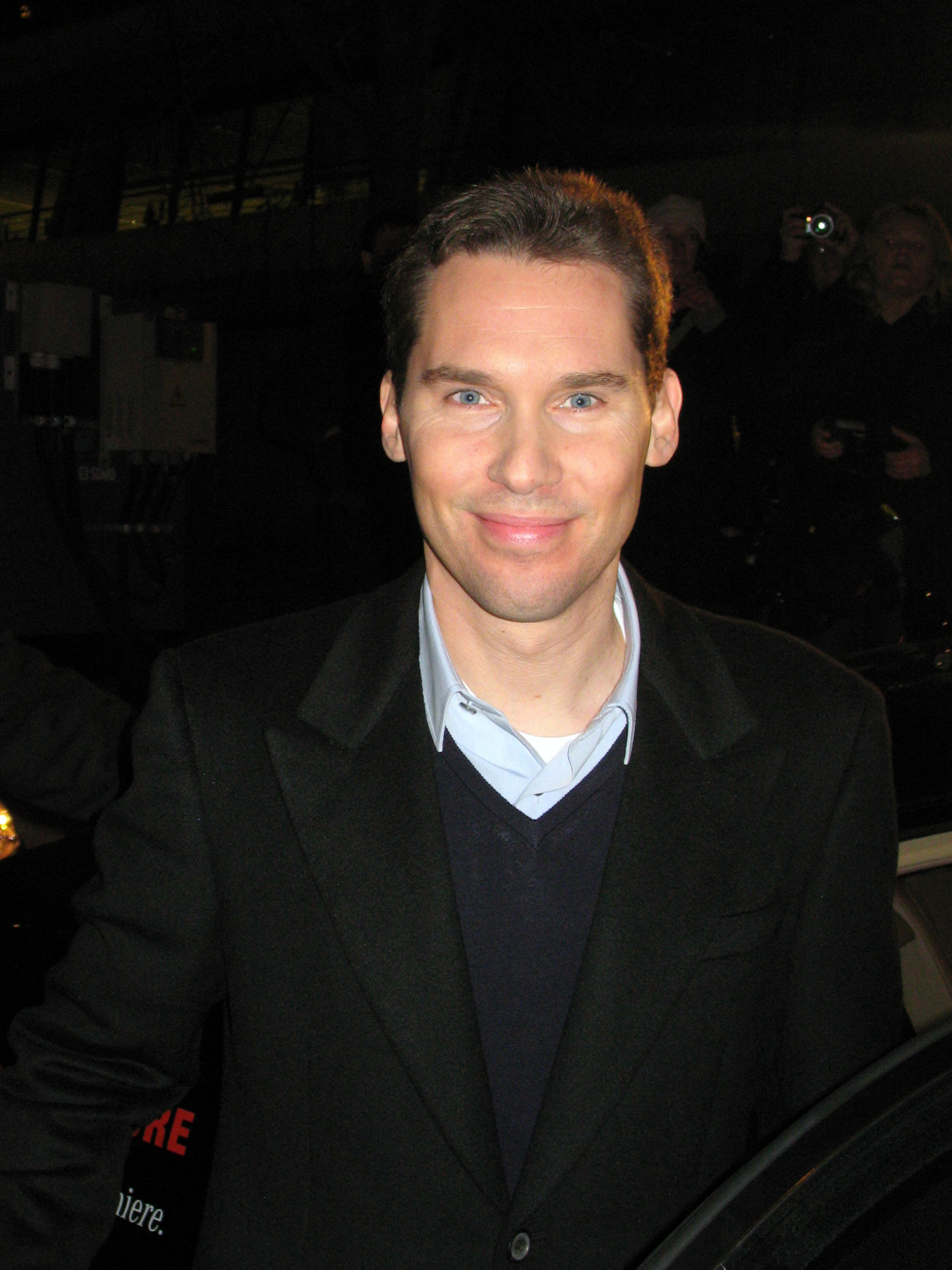 Bryan Singer bei der Valkyrie-Premiere in Berlin, 20.1.2009